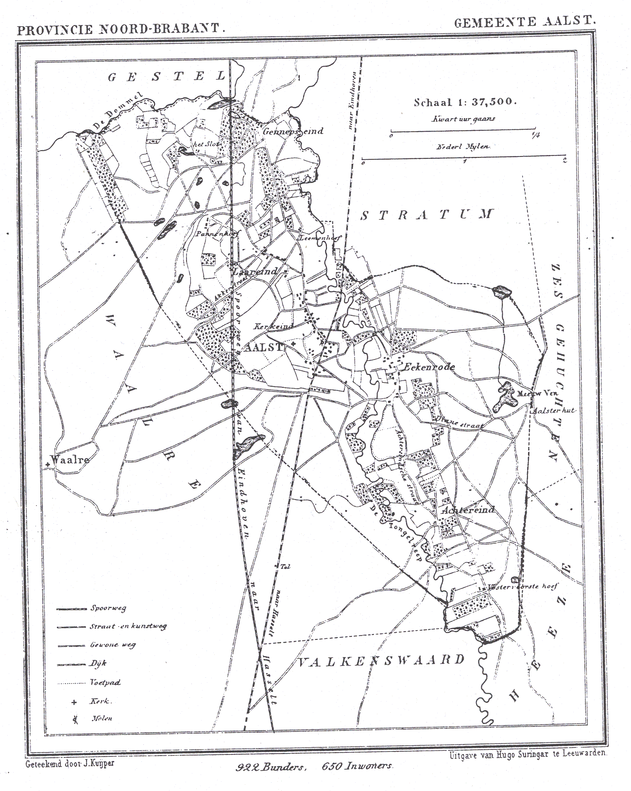 Nederland, Noord-Brabant, Gemeente Aalst